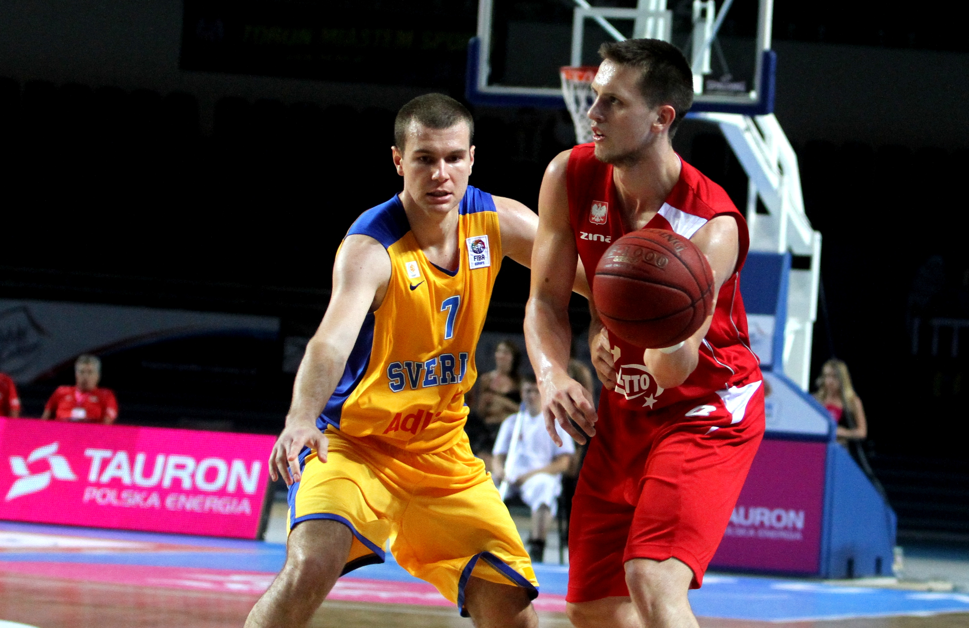 Toruń Basket Cup: Polska - Szwecja, 2 sierpnia 2014.